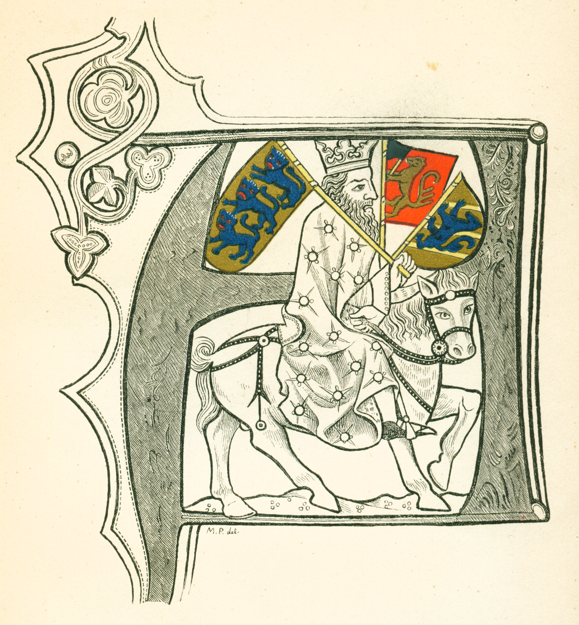 En skandinavisk konge med våbenbannere for Danmark, Norge og Sveriges gamle våbenmærke ("Folkungløven"). Fra Ernst von Kirchbergs Mecklenburgske Rimkrønike fra 1370'erne. Side 40 i den angivne kilde angiver Kirchbergs værk som Rimkrønike uden henvisning til Mecklenburg, men værkets fulde navn er angivet i Gustav Storm: Norges gamle Vaaben, Farver og Flag, Kristiania, 1894.